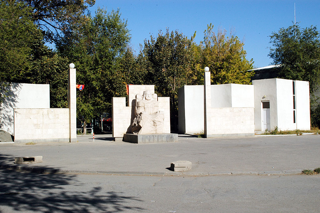 c'est photo à été pris en aout 2008, dans la ville d'Artashat, le nouveau parc